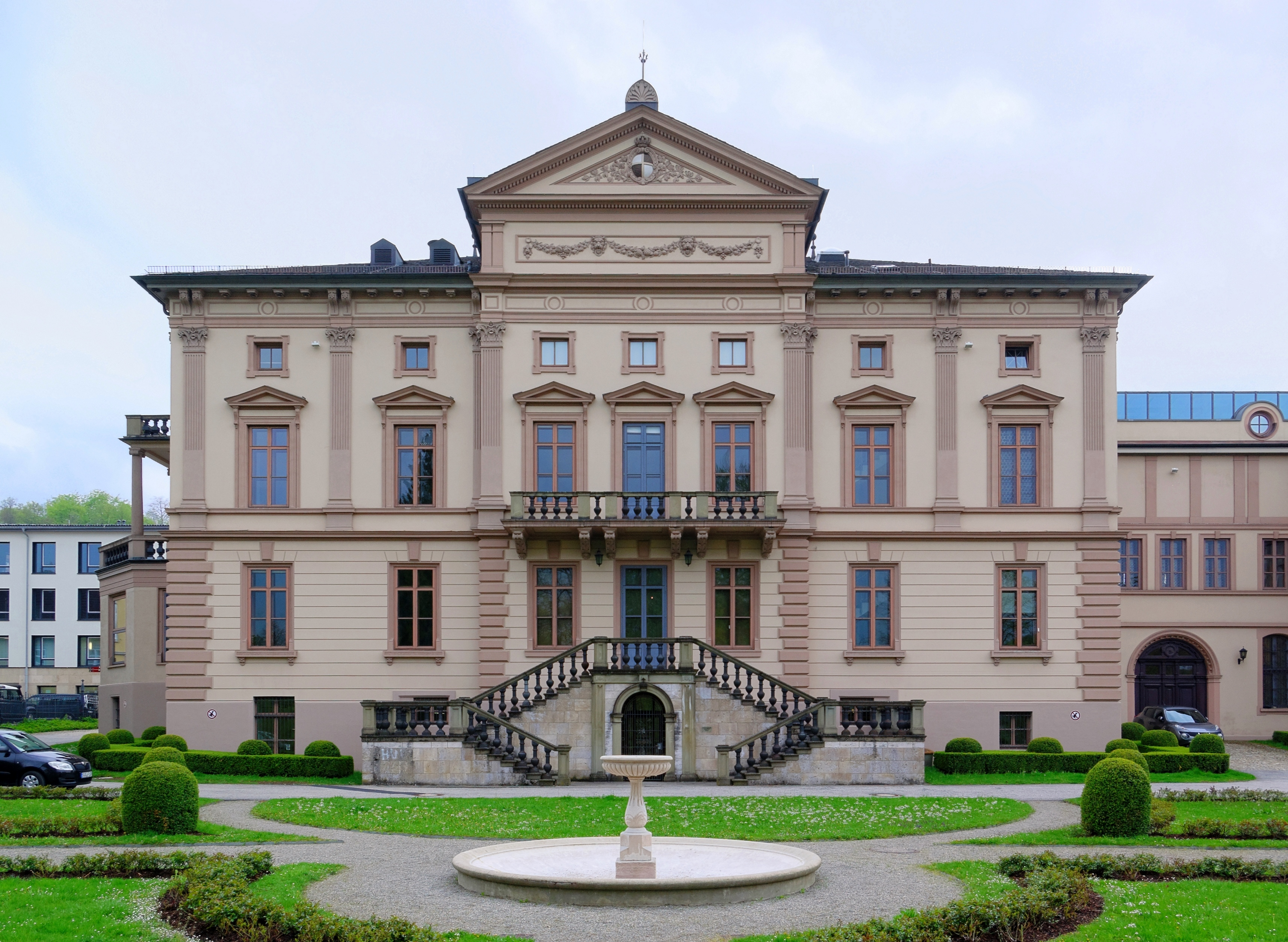 Sigmaringen, Prinzenbau, Parkseite